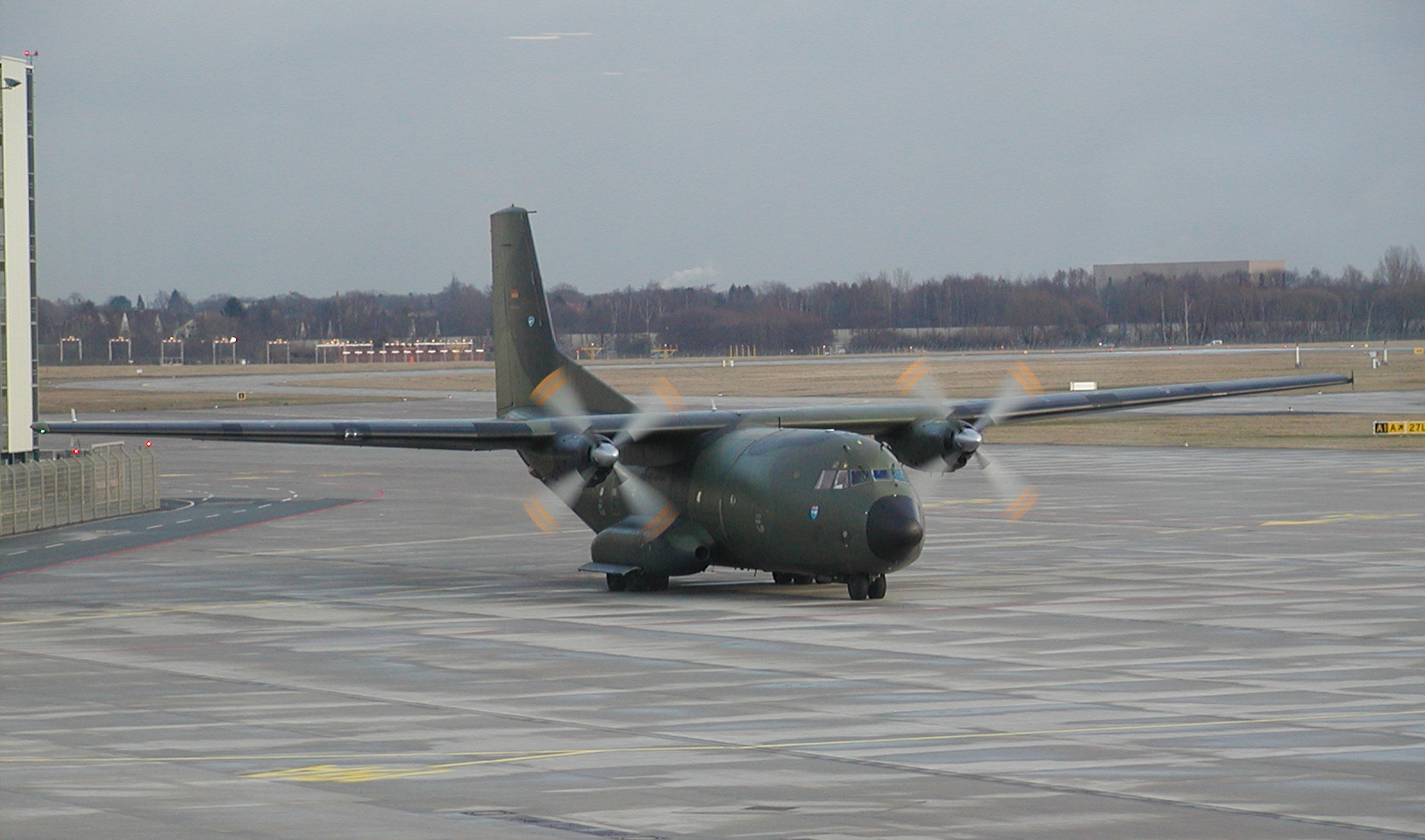 Eine Transall in Hannover